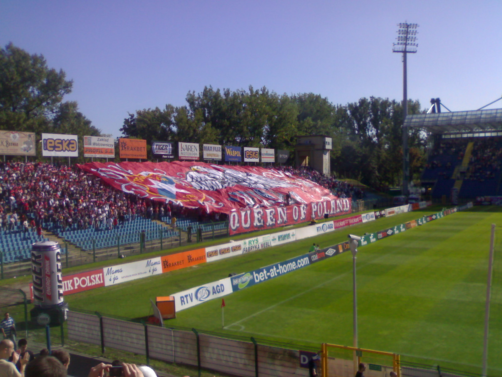 Stadion TS Wisła Kraków podczas meczu z Polonią Bytom.